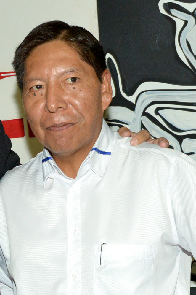 Poeta Hilário Oscanoa